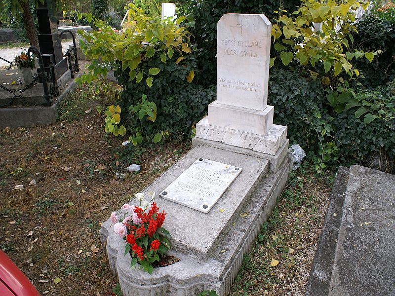 Pécsi Sebestyén (Budapest, 1910. - Budapest, 1991. május 8.) Liszt-díjas orgonaművész és zeneszerző, karnagy és állami művész sírja Budapesten. Megyeri temető: 16/0/1/101